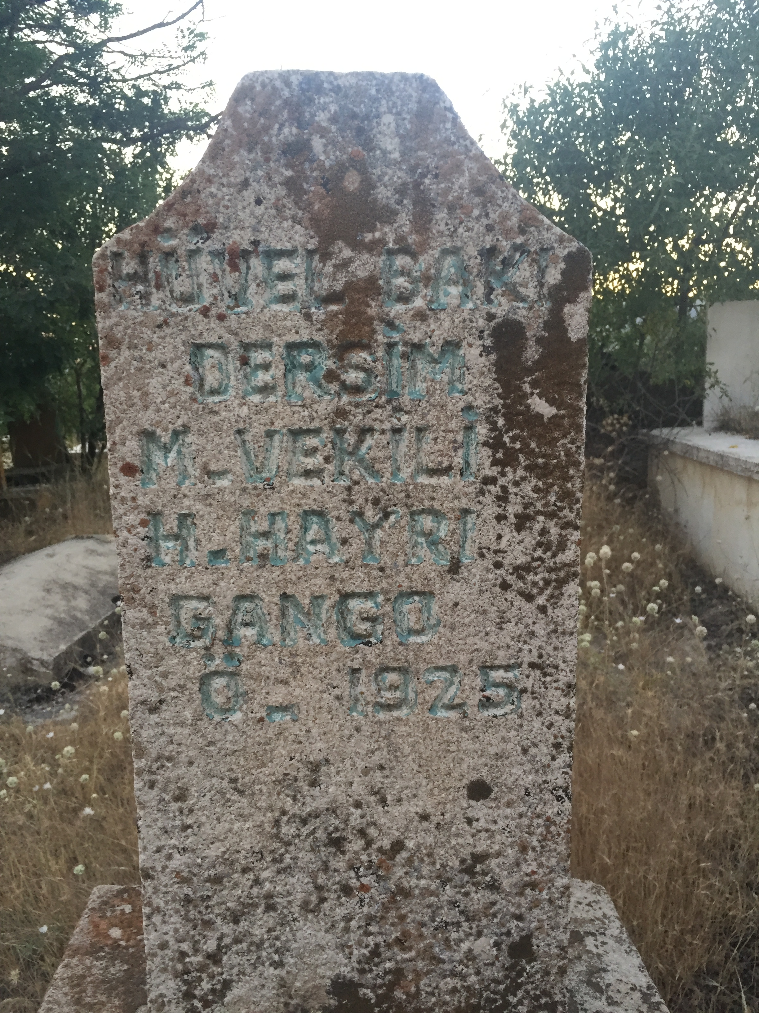 Hasan Hayri Kanko‘nun mezarı